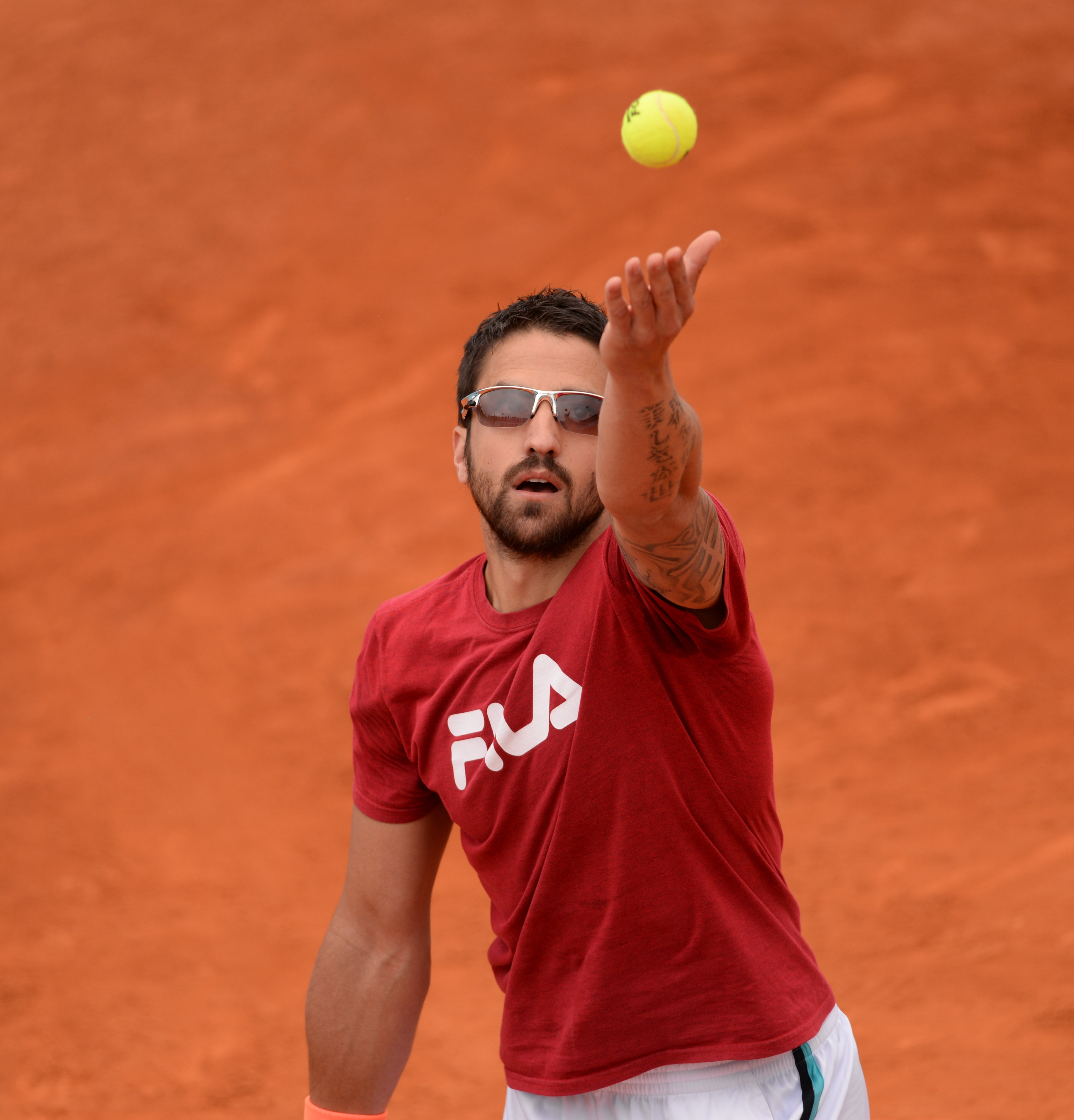 Janko Tipsarevic